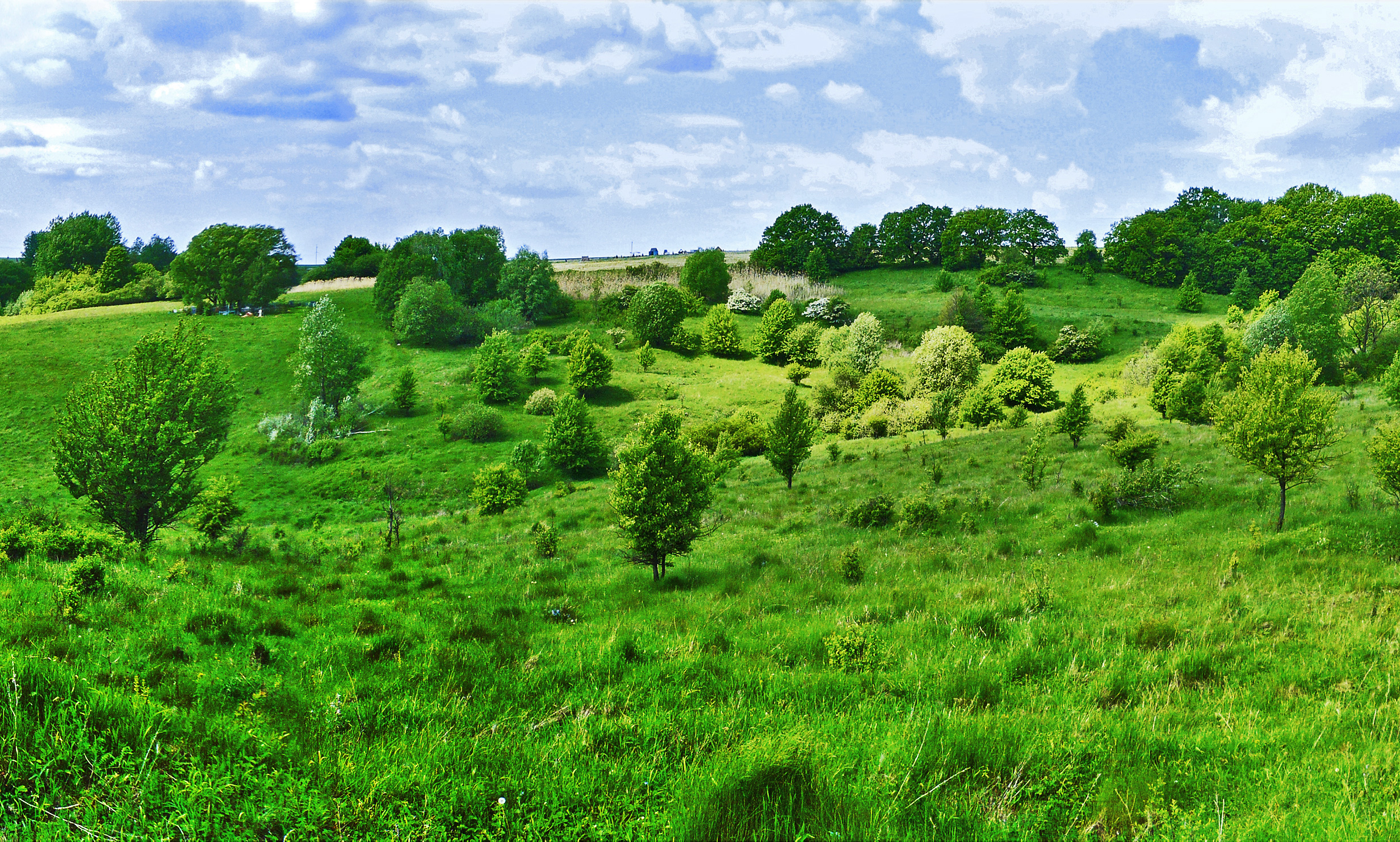 Балка Пёстрая. Родовое экопоселение "Кореньские родники". Белгородская область.